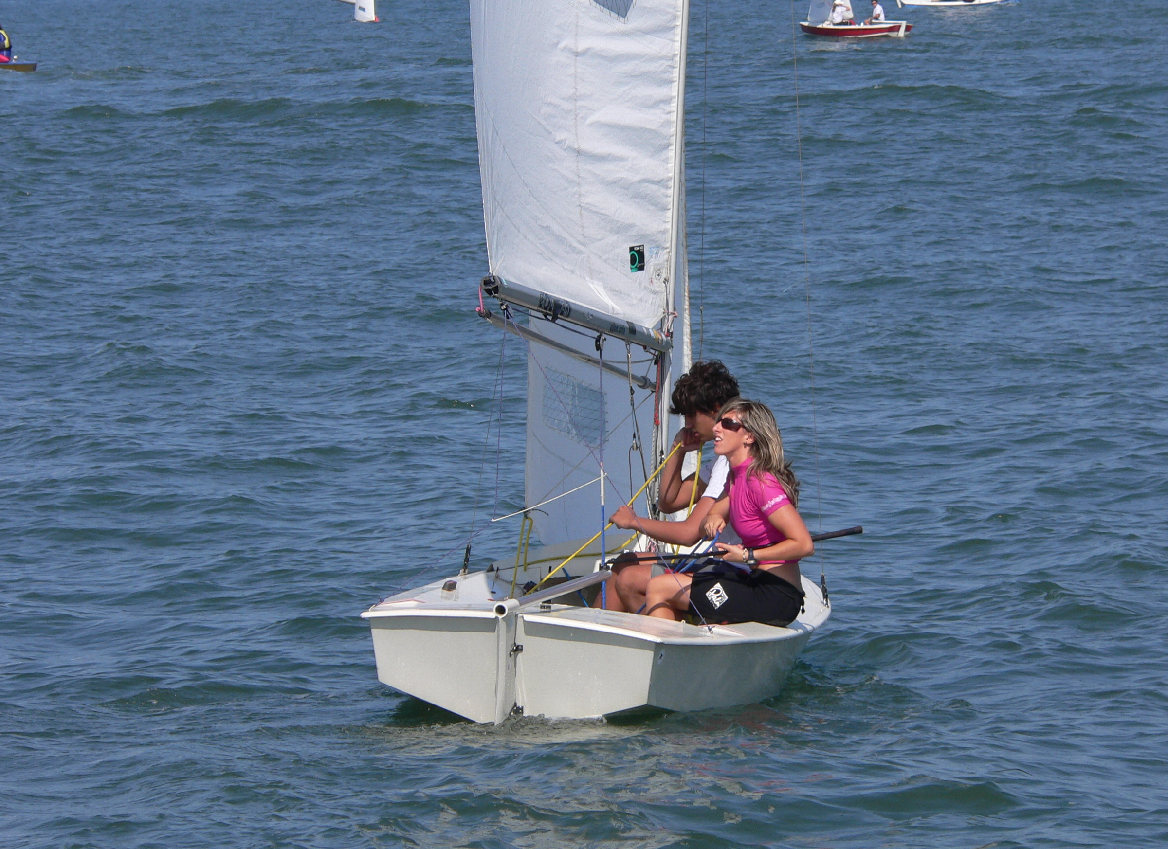 Ángela Pumariega sailing her Snipe in Gijón